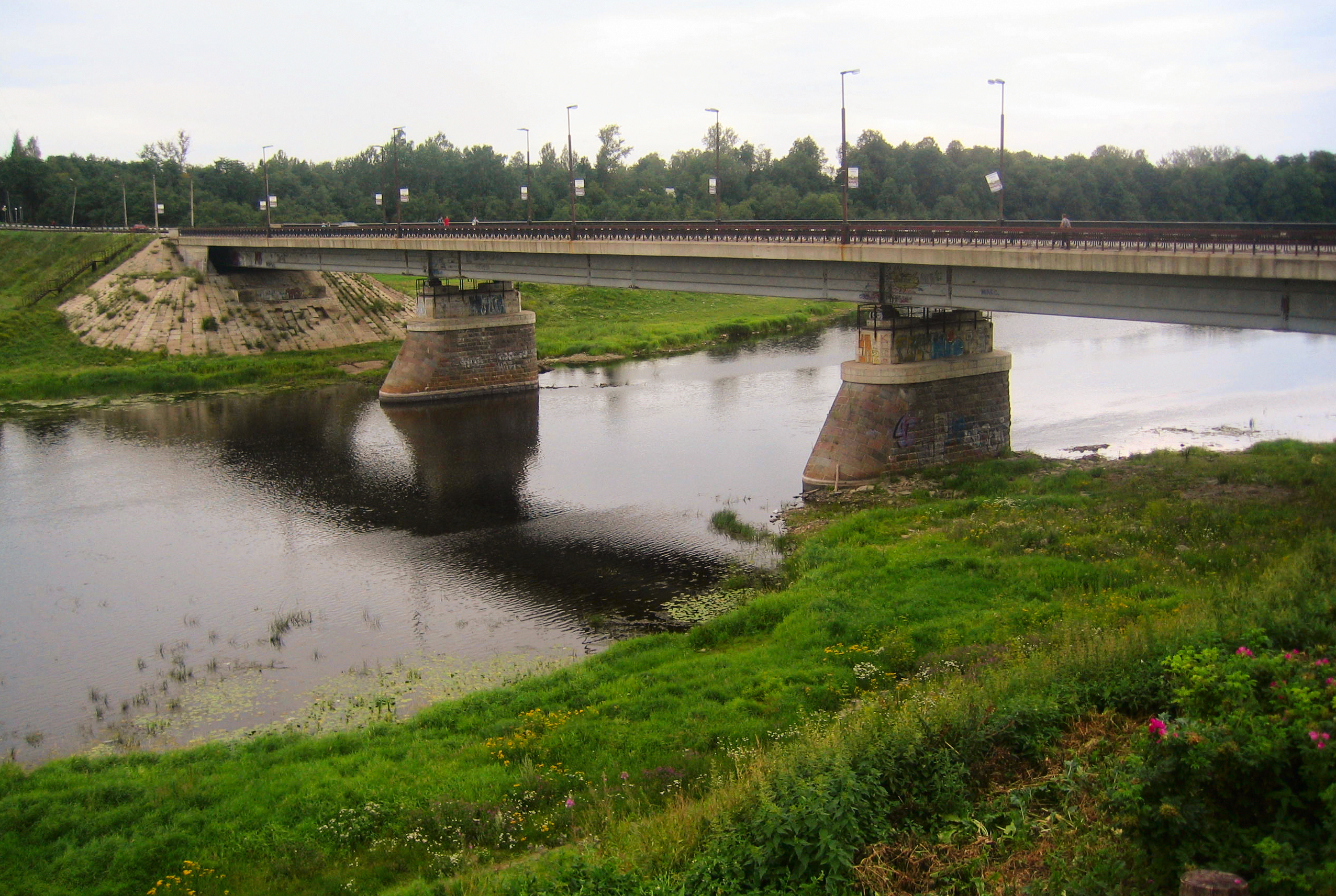 Ямбург, река Луга